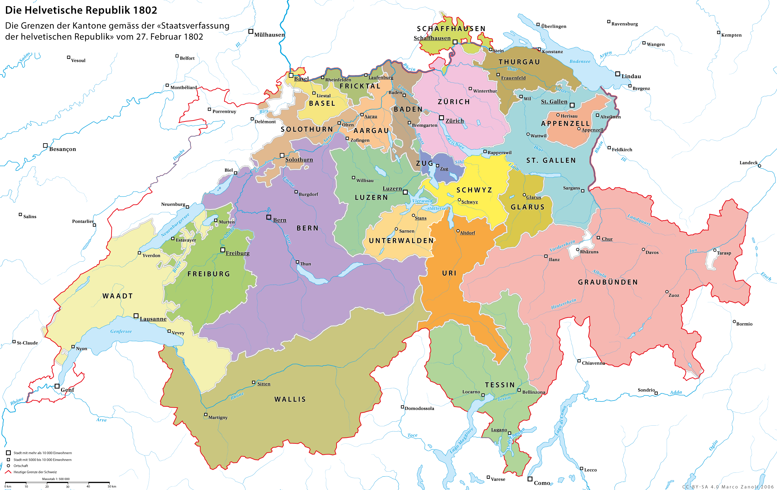 Die Helvetische Republik mit den Kantonsgrenzen gemäss dem föderalistischen Verfassungsentwurf vom 27. Februar 1802 (Entwurf Wyss) auf der Basis der Verfssung von Malmaison vom 29. Mai 1801